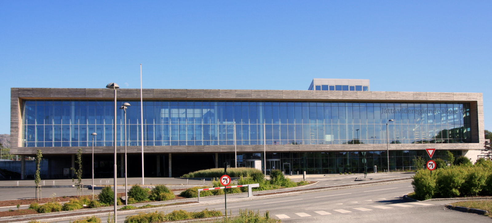 Jåttå videregående skole